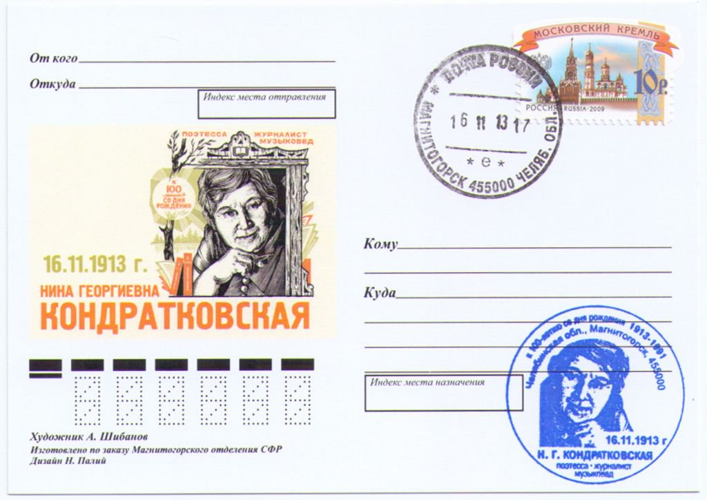 Кондратковская Нина Георгиевна, почтовая карточка